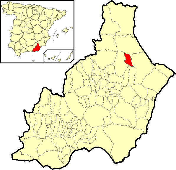 Situación del término municipal de Taberno respecto a la provincia de Almería, en España.